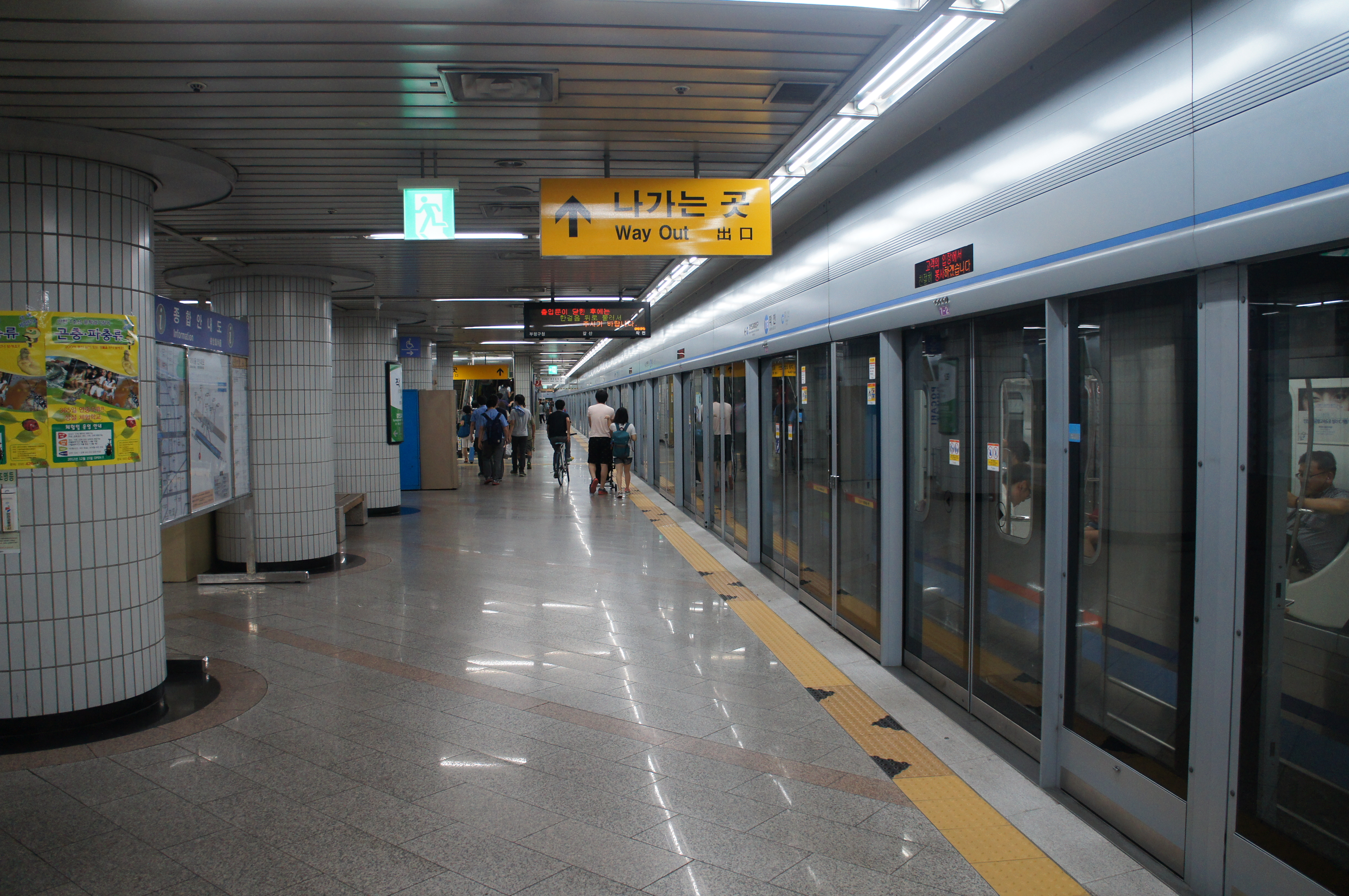 작전역 승강장